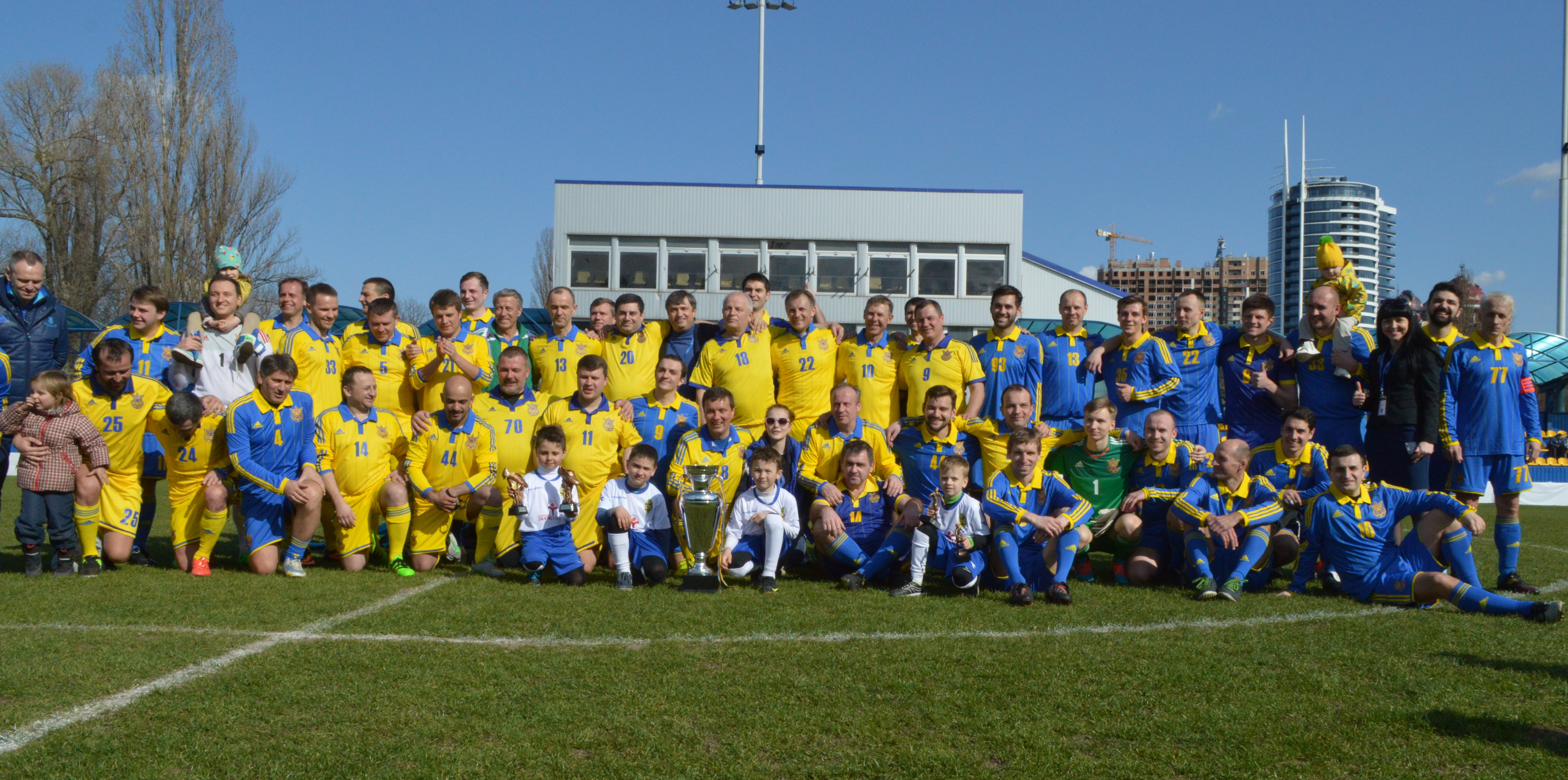 Парламентський кубок